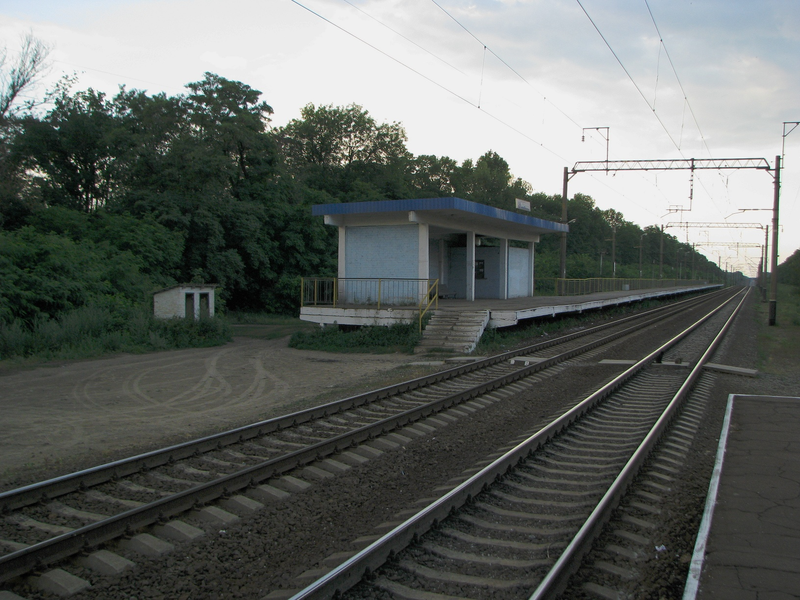 Залізнична платформа "Марківці". Село Марківці, Бобровицький район, Чернігівська область.